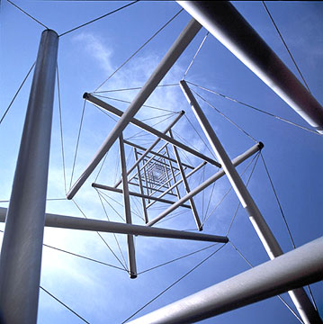 Структура тенсегріті